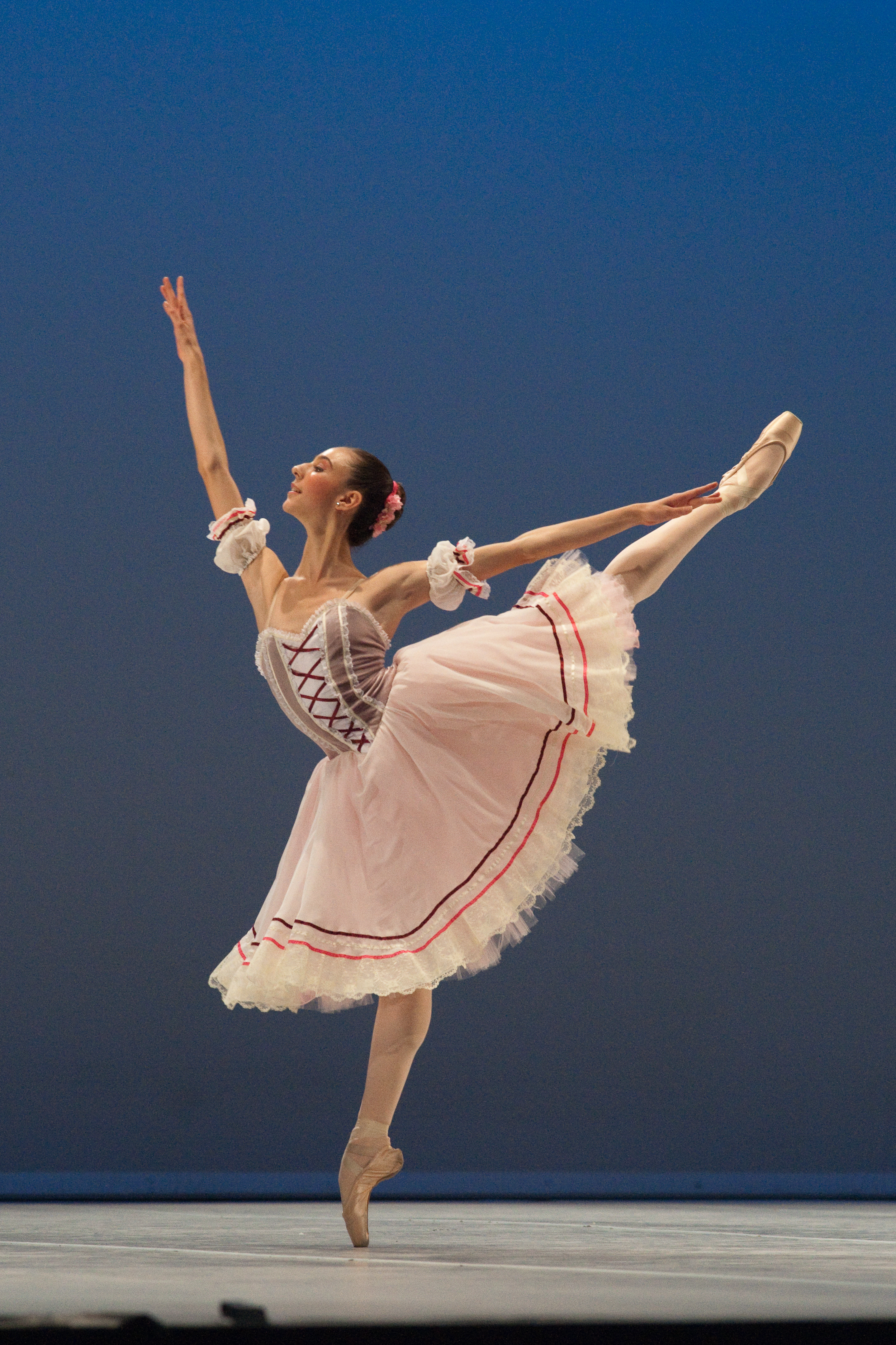 Variation extraite de Coppélia au Prix de Lausanne 2010.